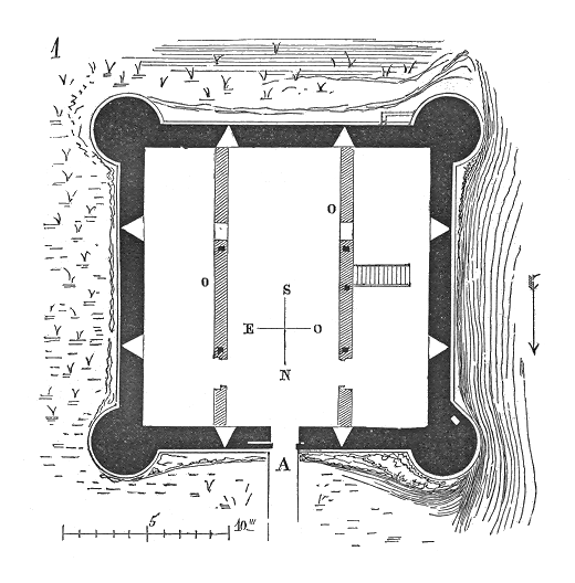 ...Le manoir de Saint-Médard est bâti sur la rive droite du ruisseau qui, sur ce point, s'étend et forme un marécage. Un fossé large entourait cette habitation fortifiée, dont nous donnons le plan au niveau du rez-de-chaussée (1). Ce plan est tracé sur un carré avec quatre tourelles aux angles. La porte est en A, et deux meurtrières s'ouvrent, à rez-de-chaussée dont le sol est peu élevé au-dessus du marécage, sur chacune des faces du carré. Dans l'origine, cette enceinte carrée enveloppait une construction de bois dont on voit les scellements sur les parois intérieures. À la place des deux murs O,O, d'une époque plus récente, il y avait quatre gros poteaux de bois qui portaient le plancher du premier, des cloisons et un pan de bois de refend. Un escalier de bois permettait de monter au premier étage. Ce rez-de-chaussée du sol au plafond n'a pas plus de 2m,65...